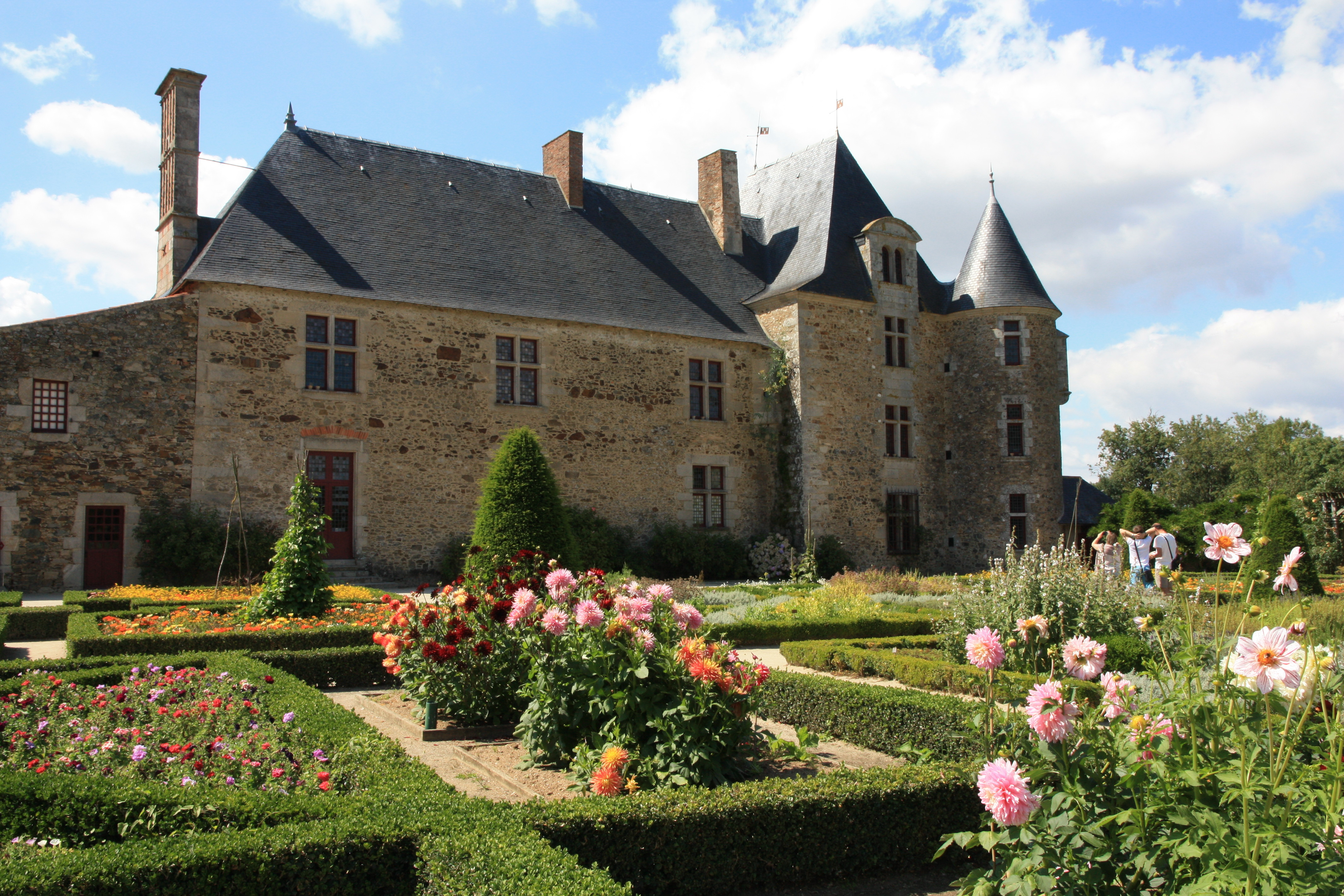 Le Logis de la Chabotterie vu depuis le jardin, Saint-Sulpice-le-Verdon, Vendée